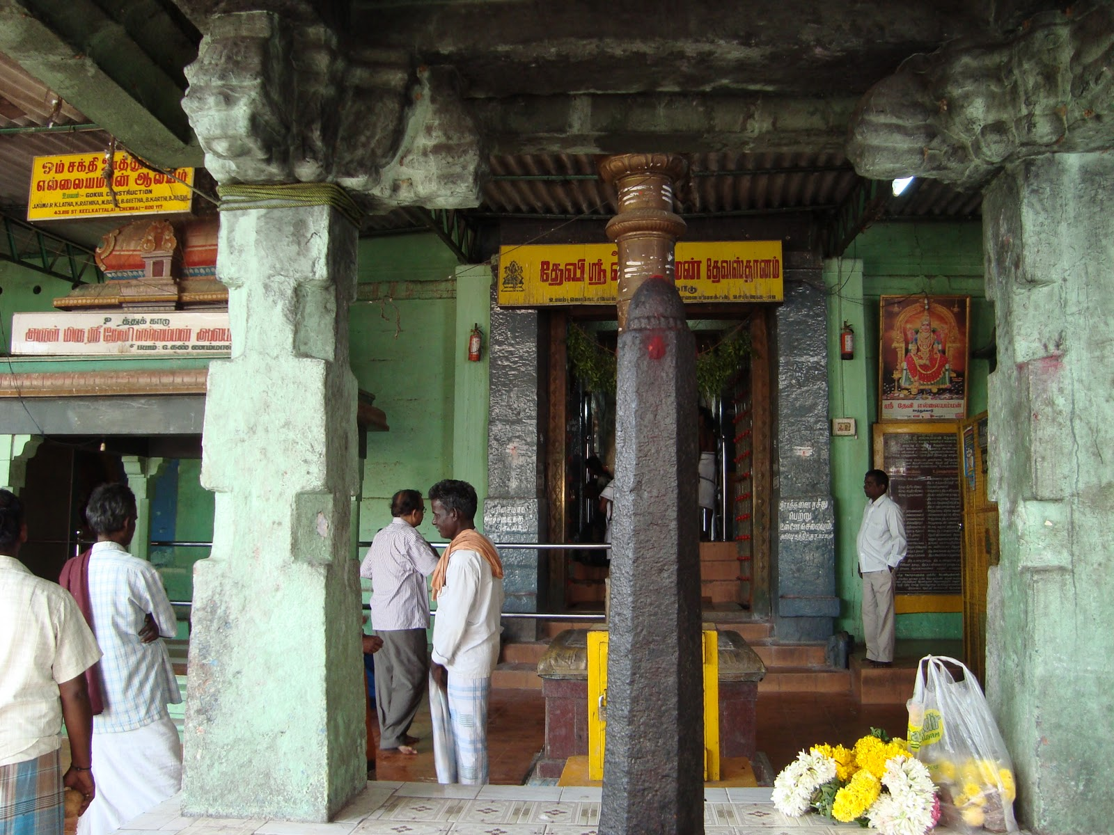 ஊத்துக்காடு எல்லம்மன் கோயில் - கூம்பு வடிவில் பலிபீடம்